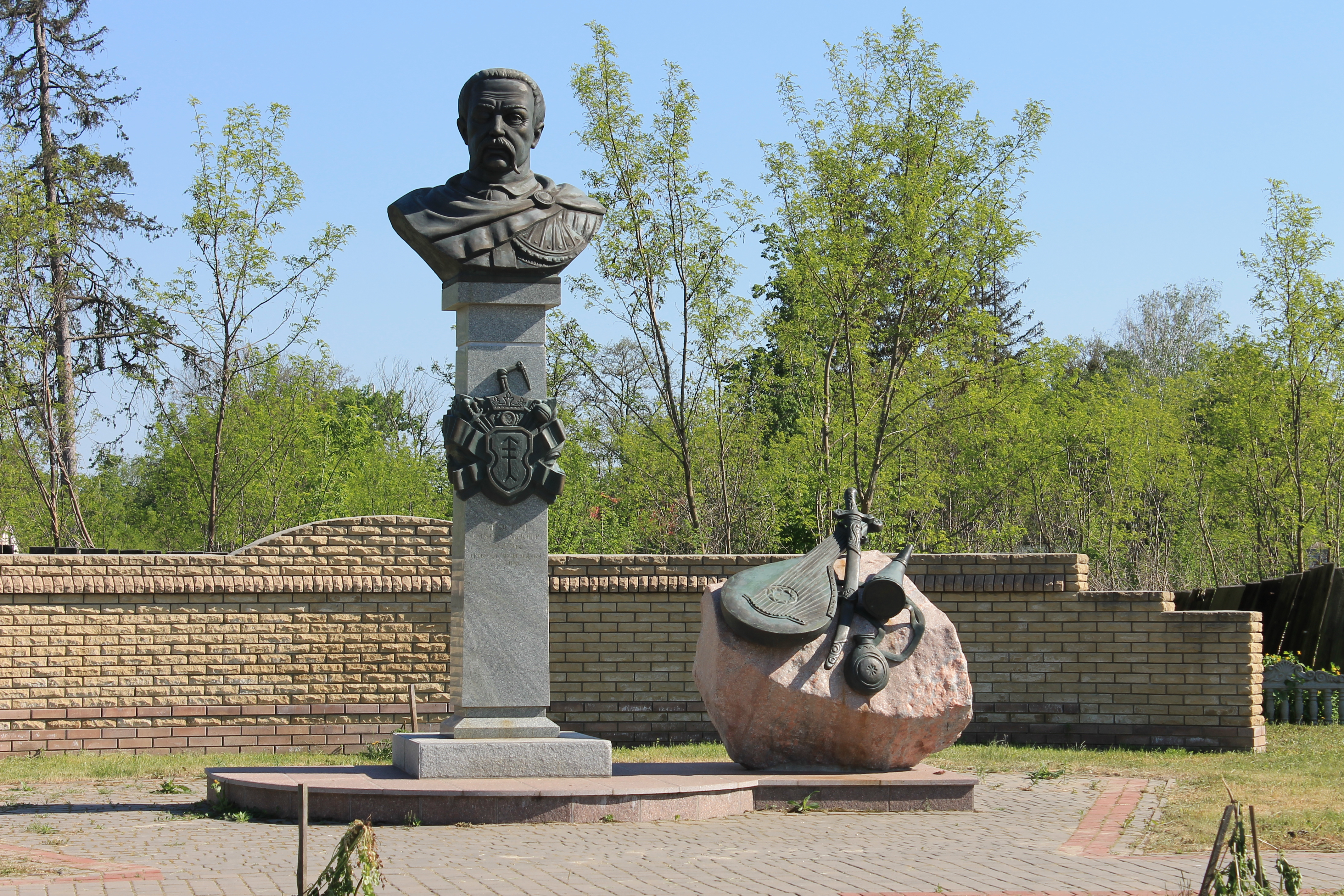 Пам’ятник-погруддя гетьману Данилу Апостолу, с. Великі Сорочинці, Миргородський р-н., Полтавська обл.